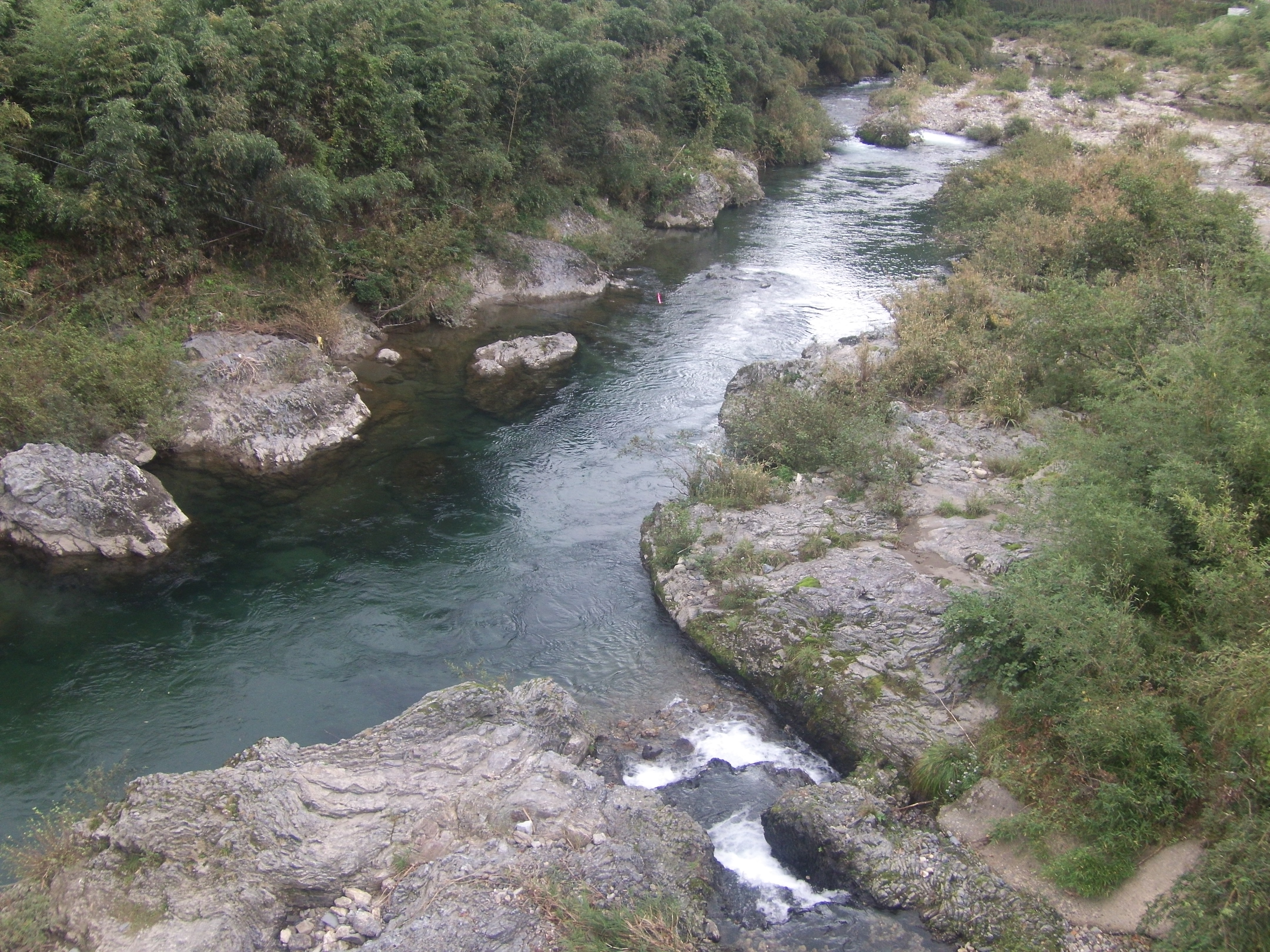 南丹市の京都丹波高原国定公園内を流れる由良川